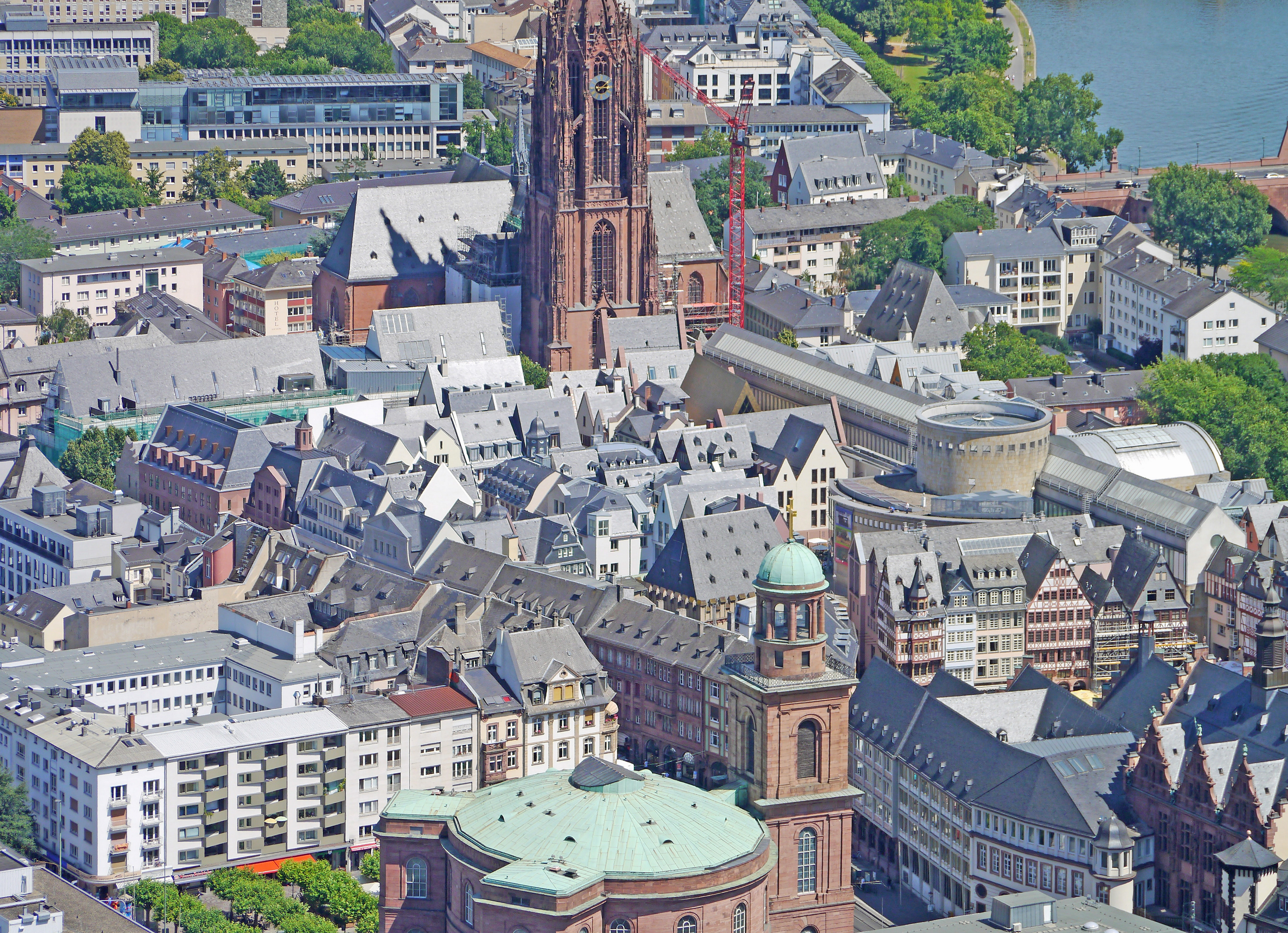 Das Dom-Römer-Projekt, im Juni 2018, vom Maintower aus.